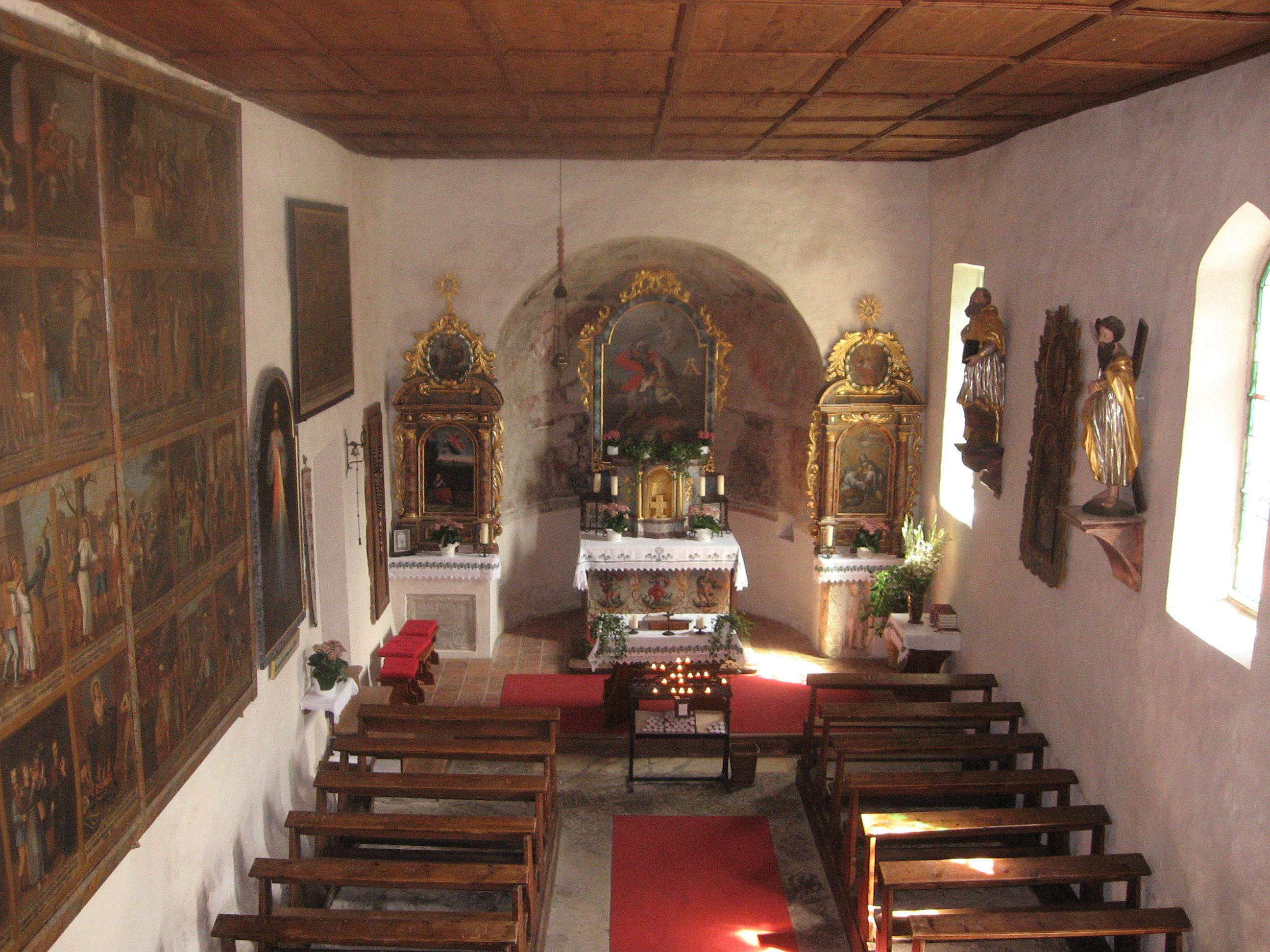 Inside the church on Danienslberg, Reißeck, Austria.